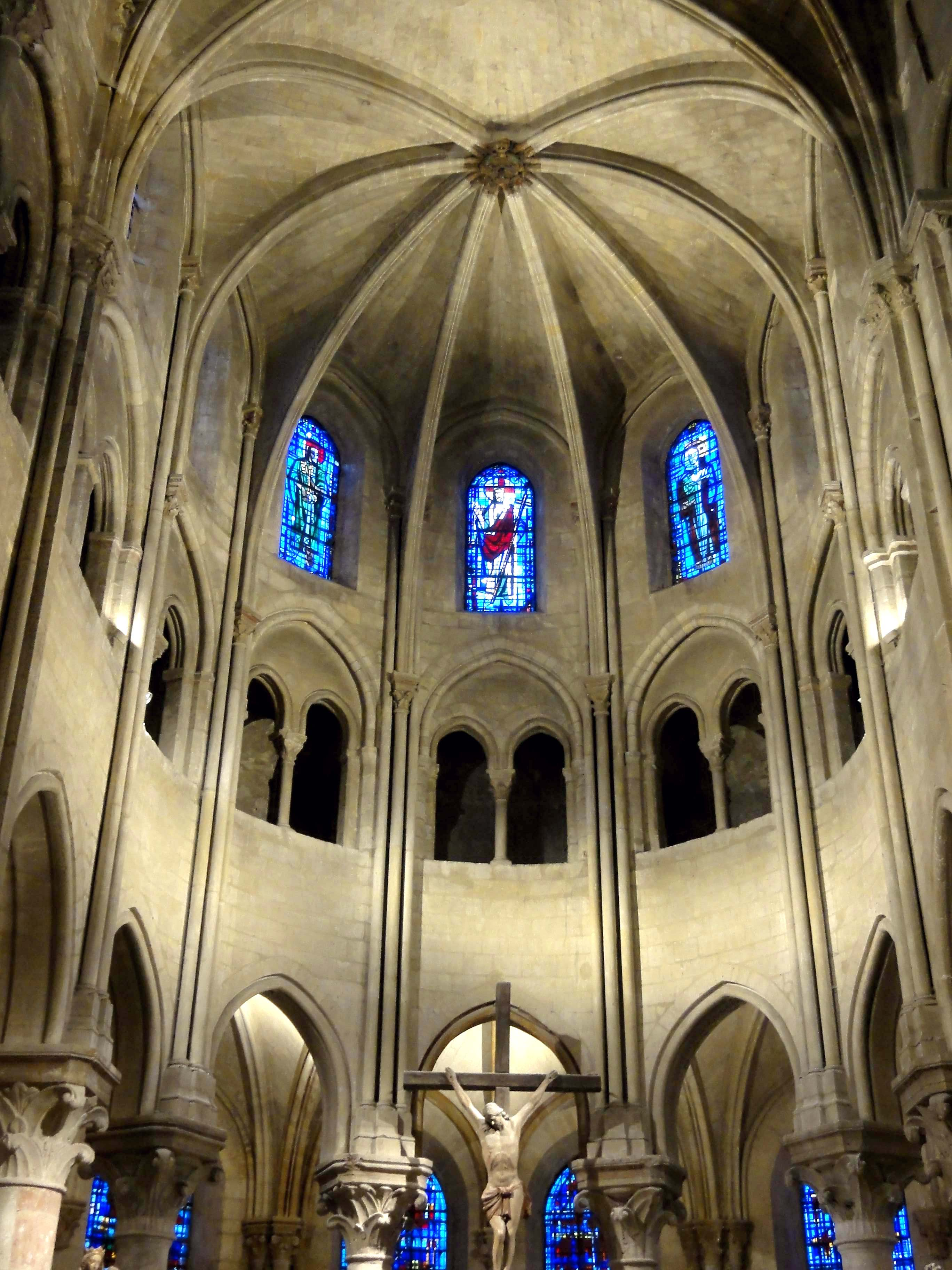 Intérieur de l'église - voir titre.